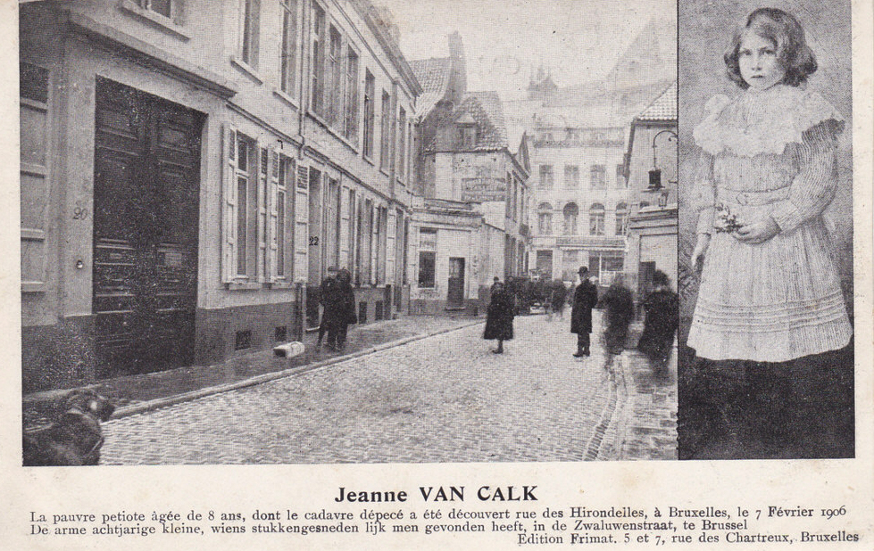 Lieu où fut retrouvé le cadavre de Jeanne Van Calck le 7 février 1906